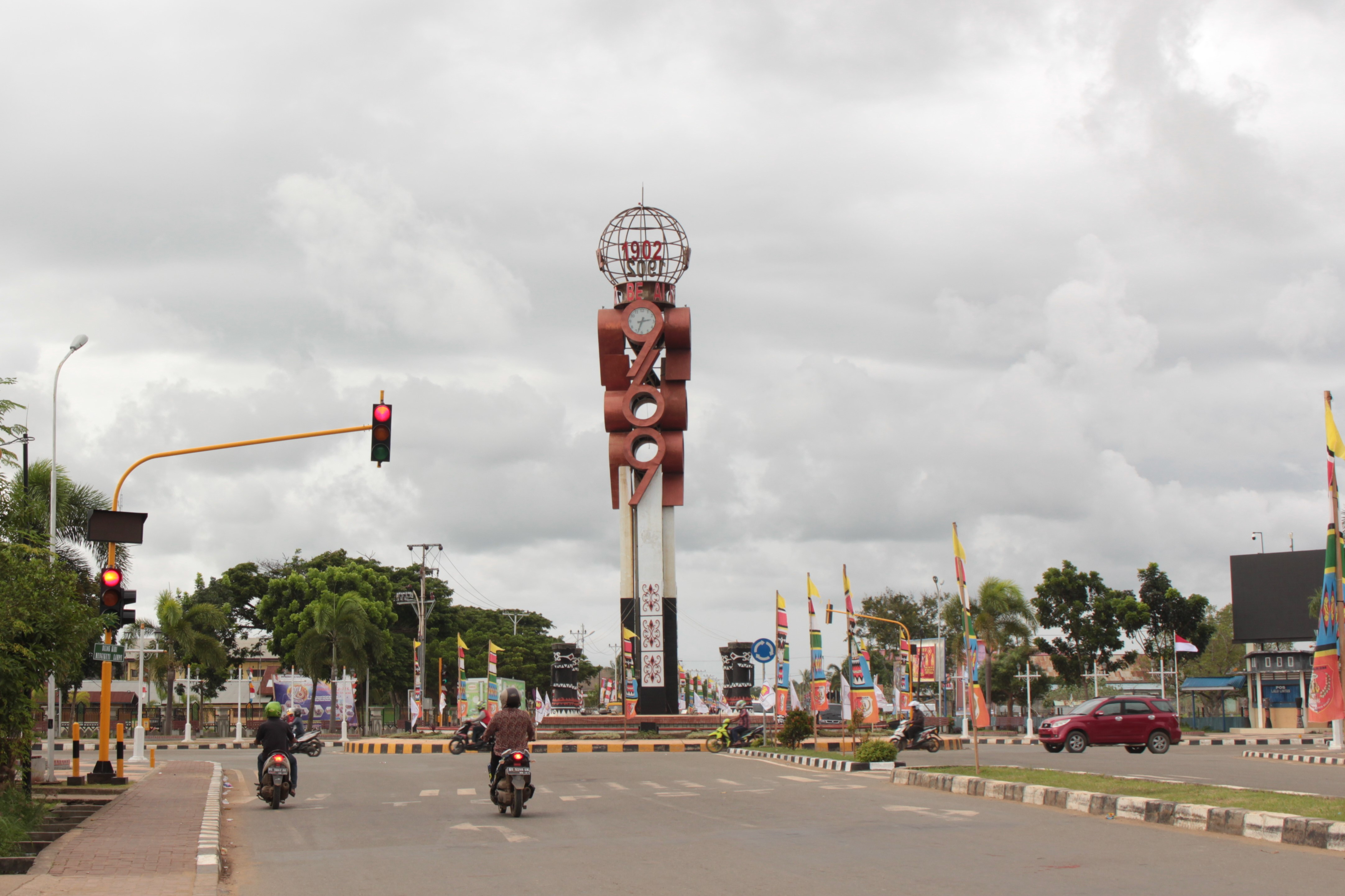 Tugu lingkaran Brawijaya di pusat kota Merauke.